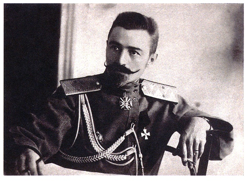 Général Sergueï Leonidovitch Markov